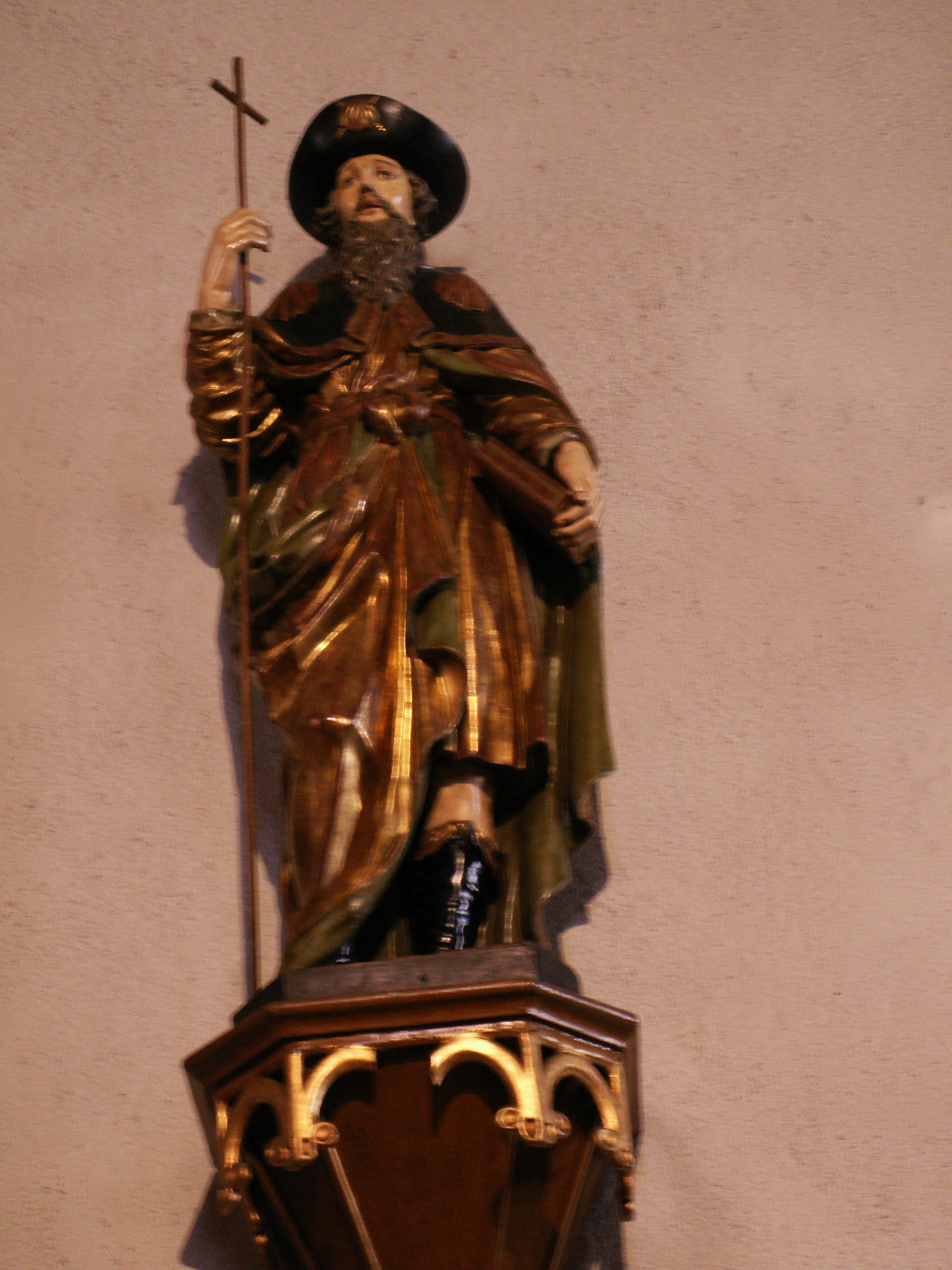 Statue de saint Jacques dans l'église paroissiale dédiée à saint Jacques dans la commune de Sainte-Florine